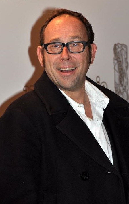 Olivier Gourmet à la cérémonie des César